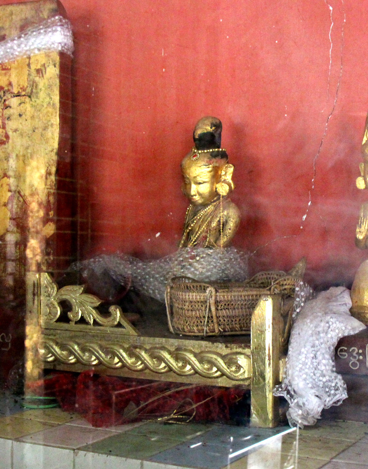 မြန်မာဘာသာ: မနှဲလေး (ပုဂံရှိ ရွှေစည်းခုံဘုရားအတွင်းမှ)